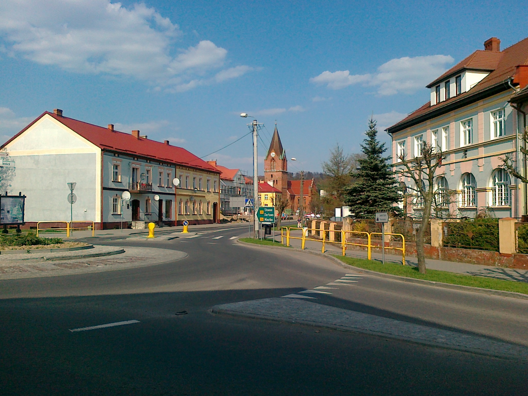 Uliczne rondo w Polanowie